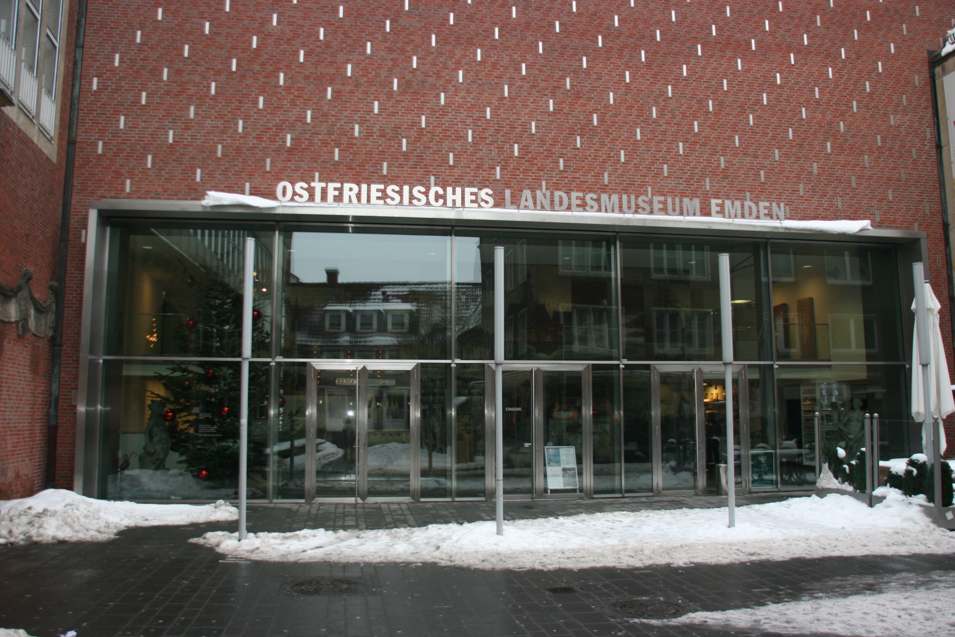 Ostfriesisches Landesmuseum Emden